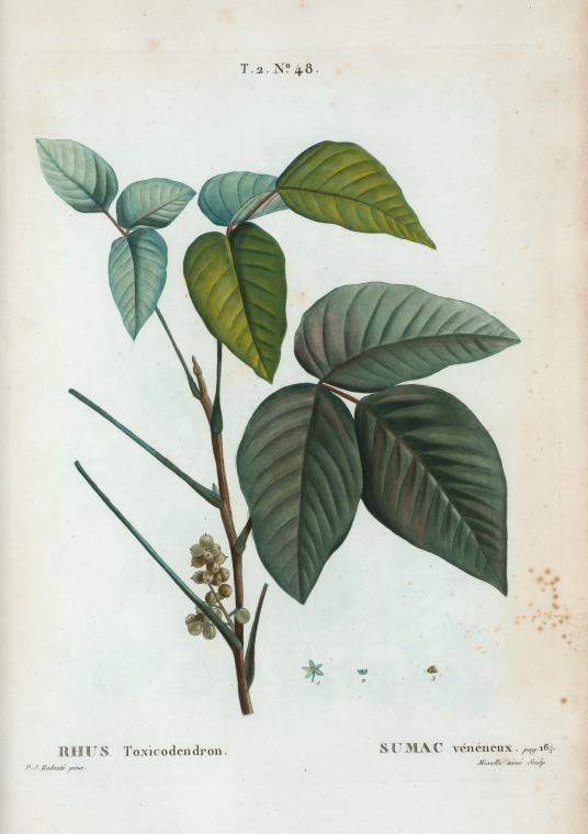 Rhus toxicodendron = Sumac vénéneux.